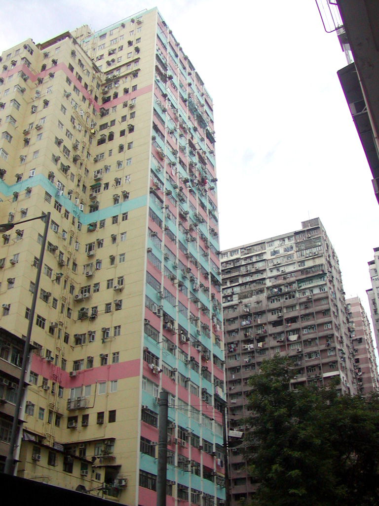 僑冠大廈於2007年完成復修工程。